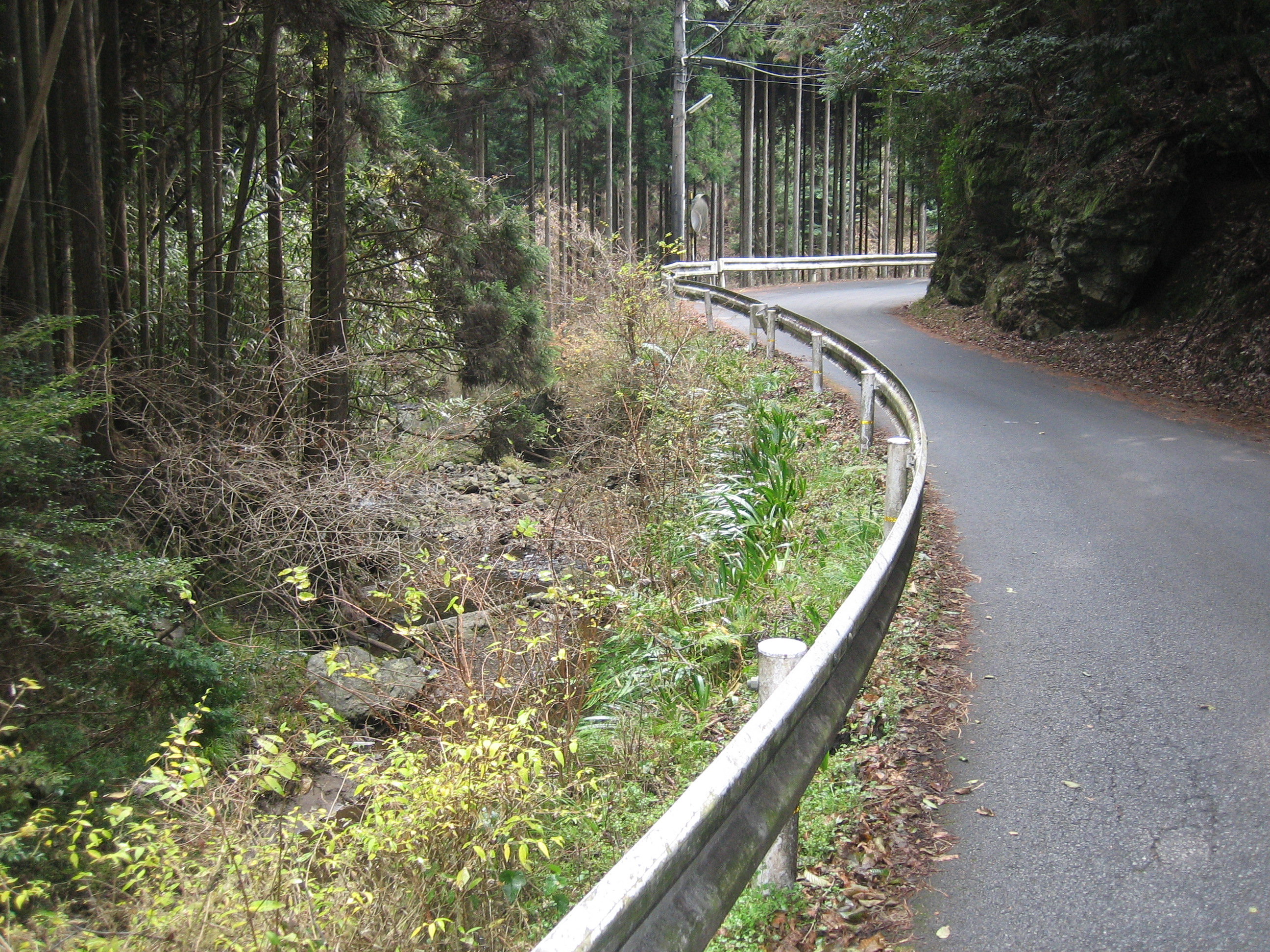 京都府道107号雲ヶ畑下杉坂線を京都市北区杉阪東谷から撮影